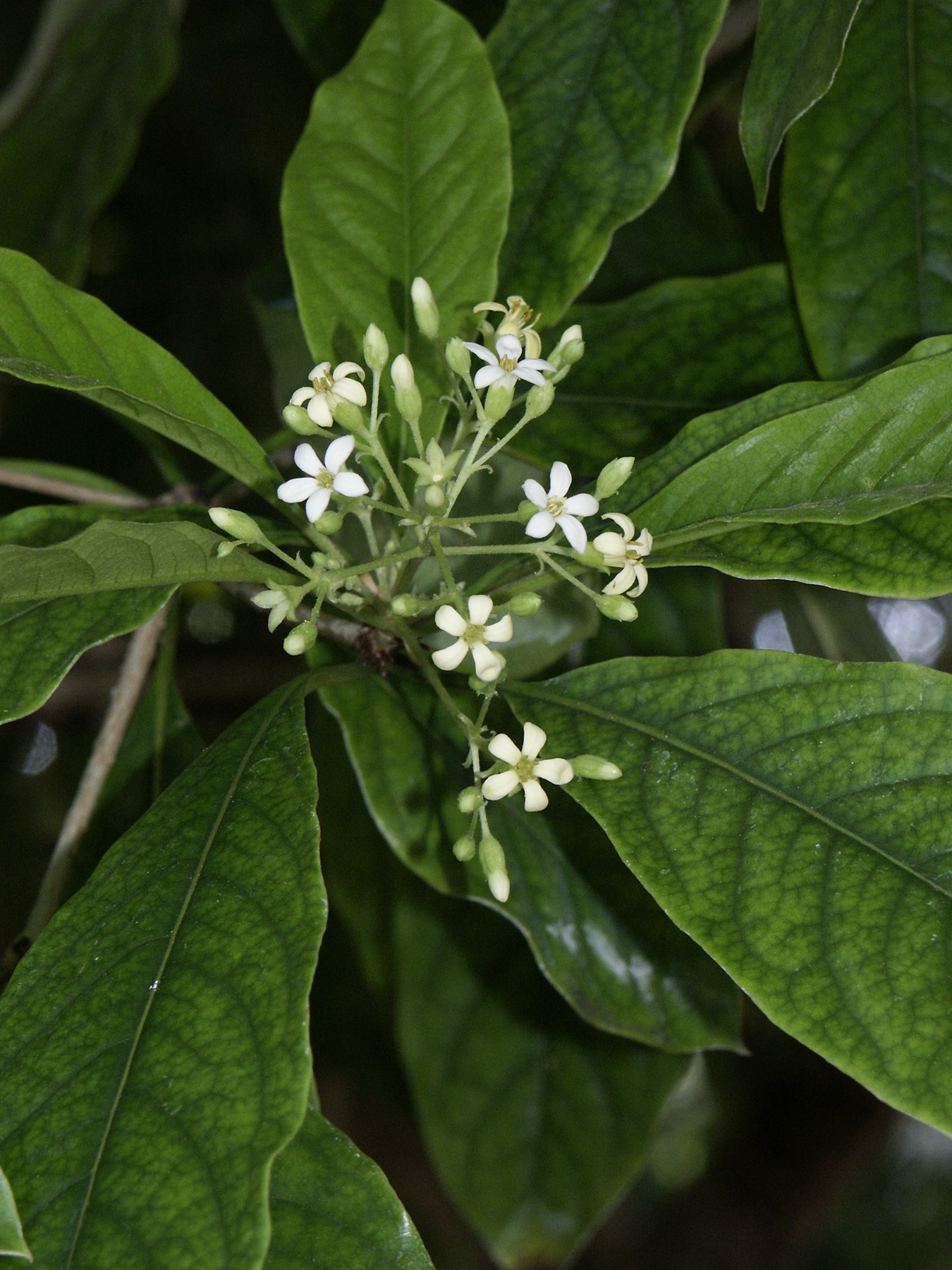 Pittosporum moluccanum Fairchild Tropical Botanic Garden, Miami, FL, USA. Fragrant.